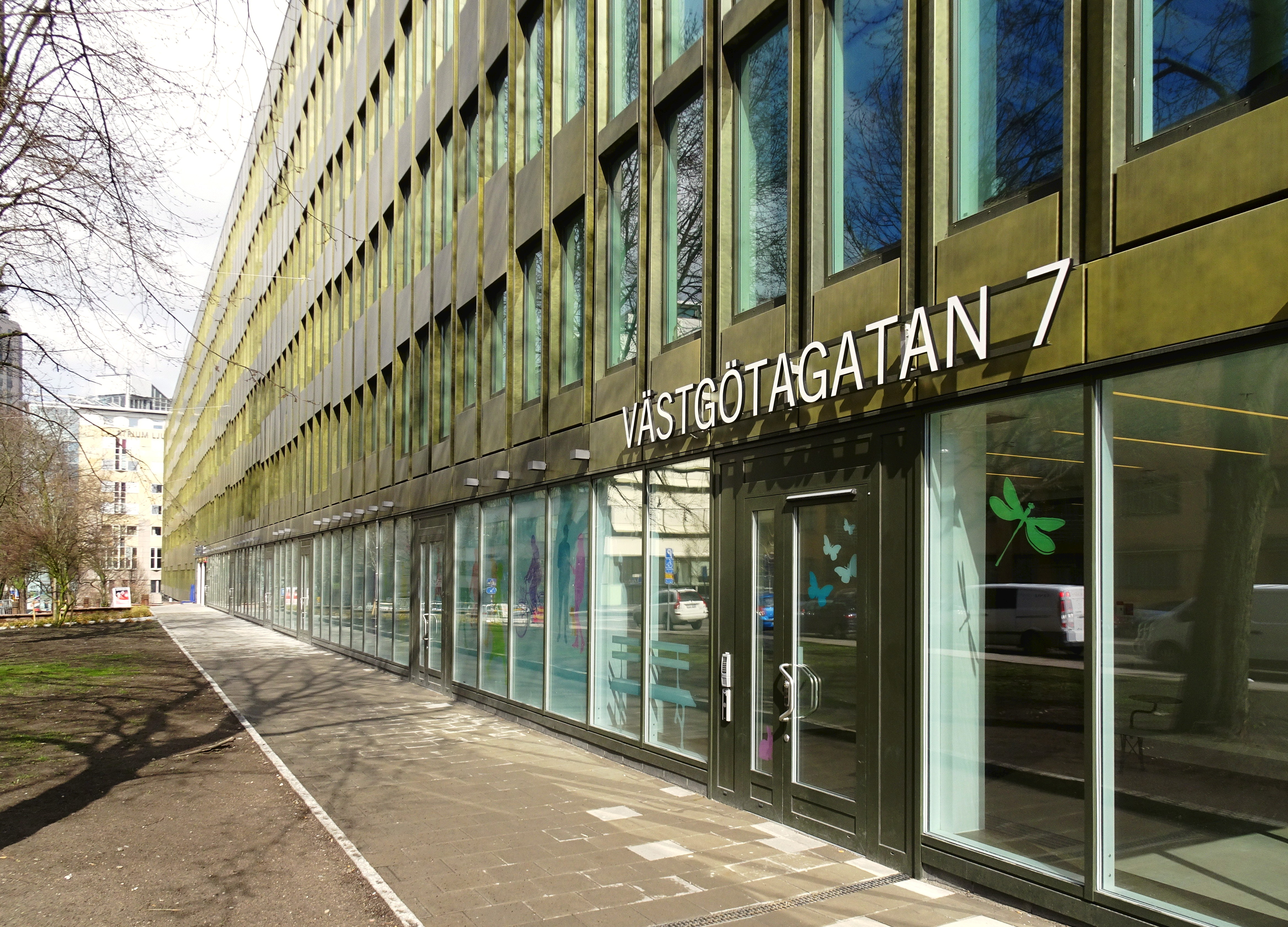 Kvarteret Nattugglan 14, Västgötagatan 1-7